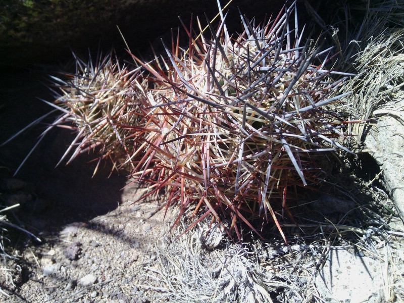 Austrocactus bertinii poblíž Malargue